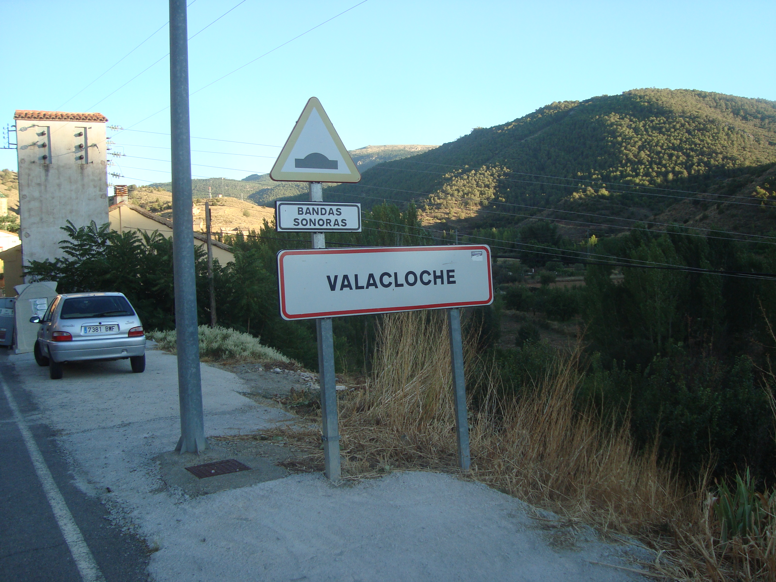 Valacloche es una localidad y municipio de la provincia de Teruel. Pertenece a la comarca Comunidad de Teruel. Se encuentra en un valle junto al río de Camarena, en las faldas de la Sierra de Javalambre.